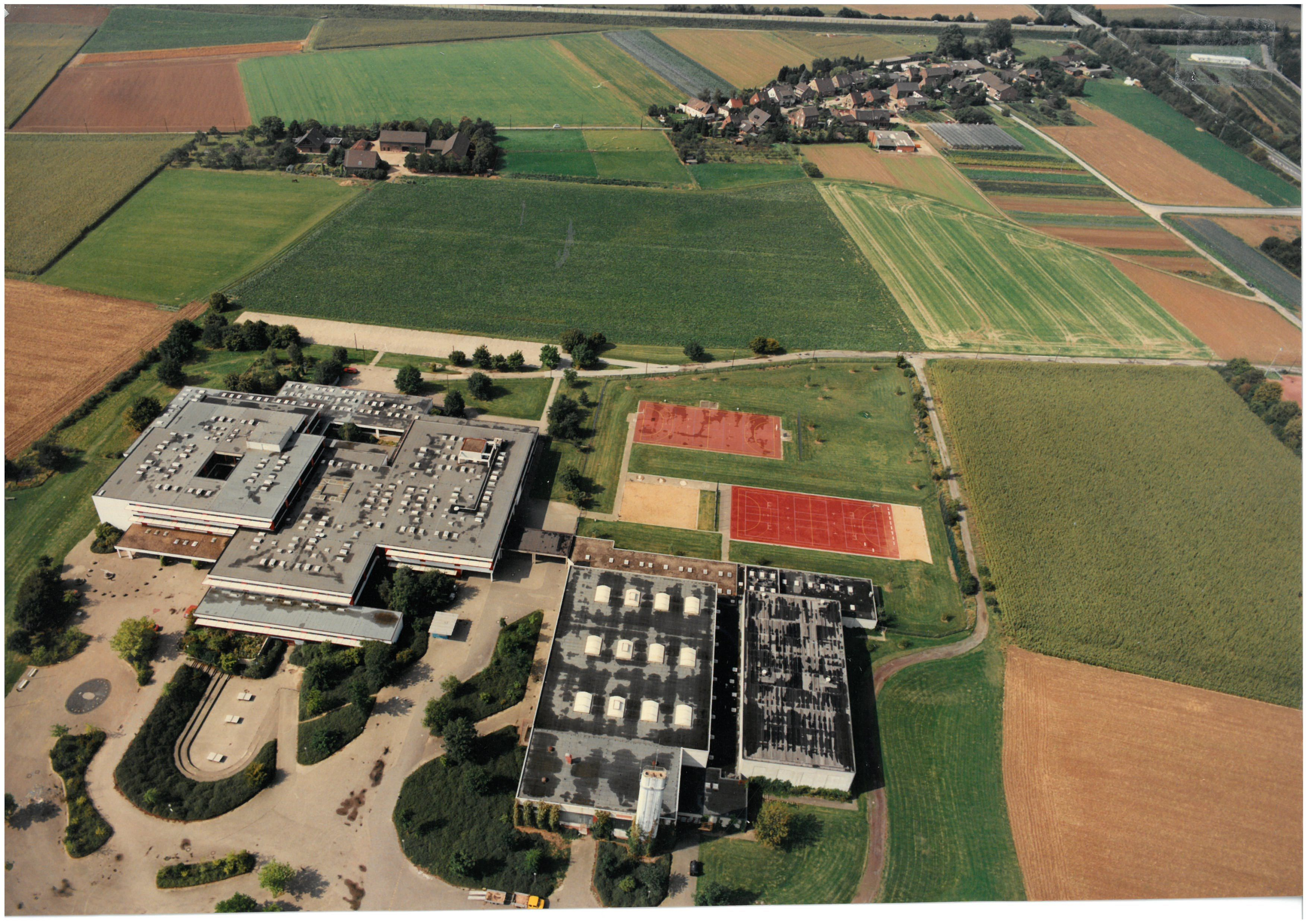 Luftaufnahme SMG